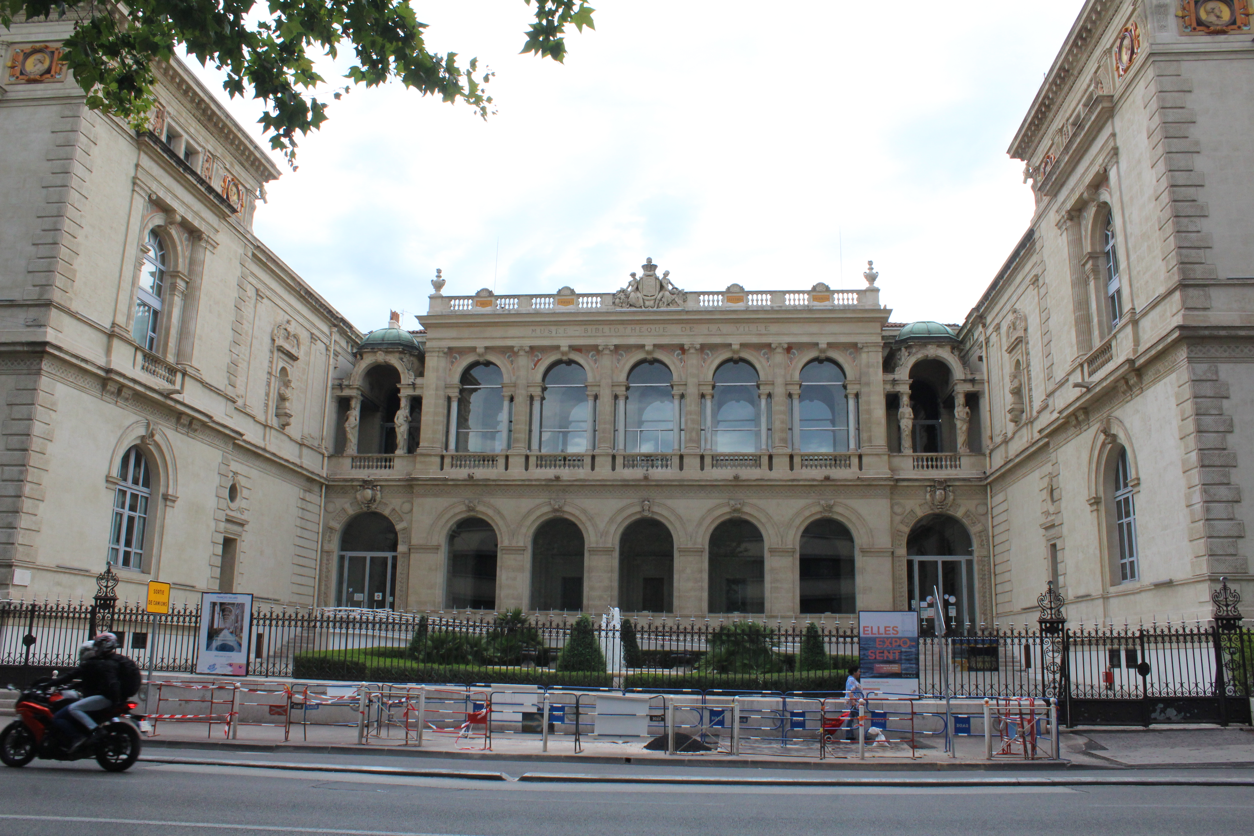 Musée-bibliothèque de la ville de Toulon.